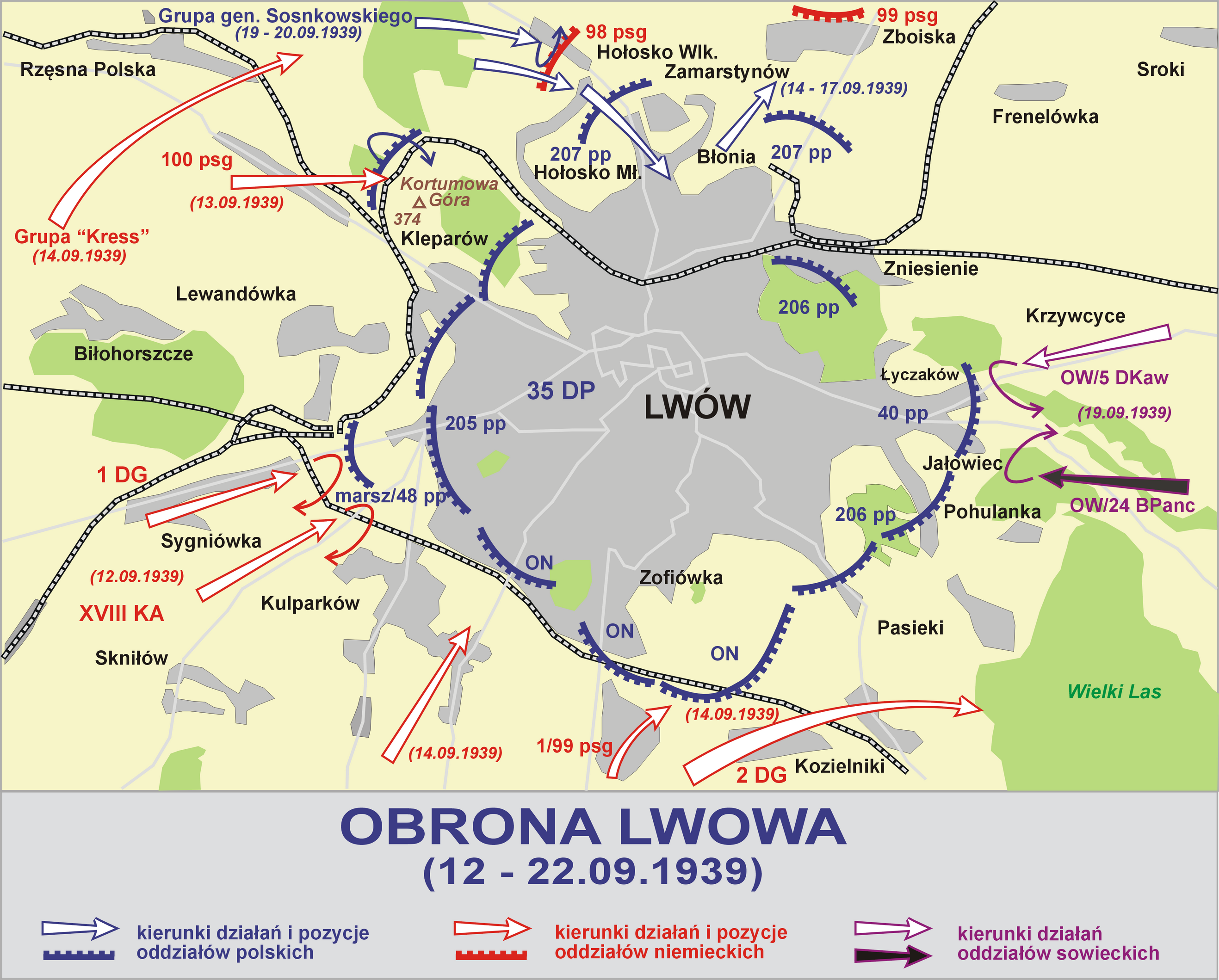 Obrona Lwowa (12-22.09.1039)